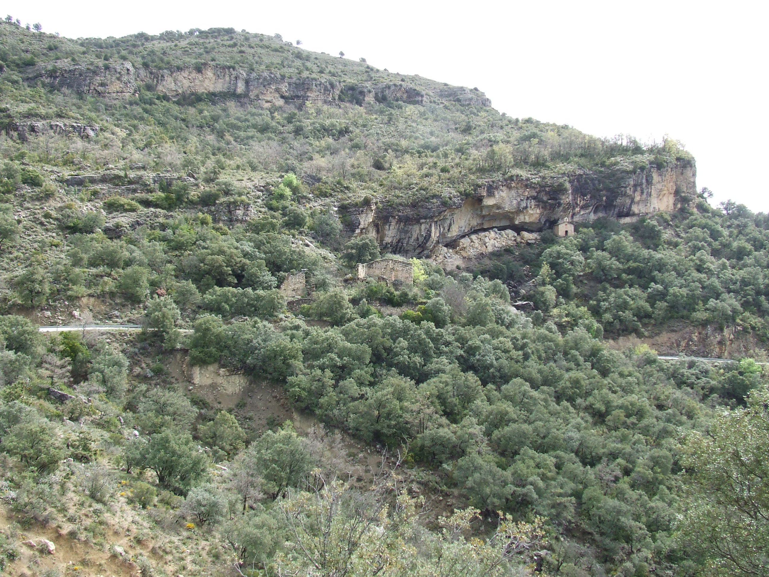 Antiga caseria de les Esplugues (Mur, Castell de Mur, Pallars Jussà)